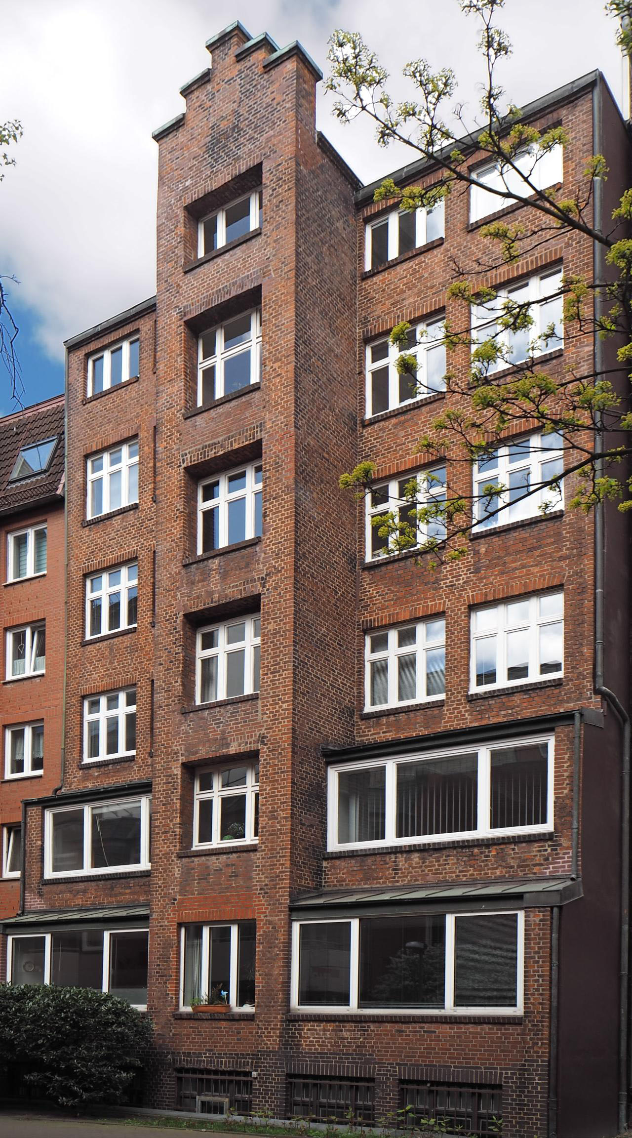 Hamburg-Altstadt, Edmundhaus , Hinterhaus an der Straße Katharinenfleet , Foto: 2016 This is a photograph of an architectural monument.